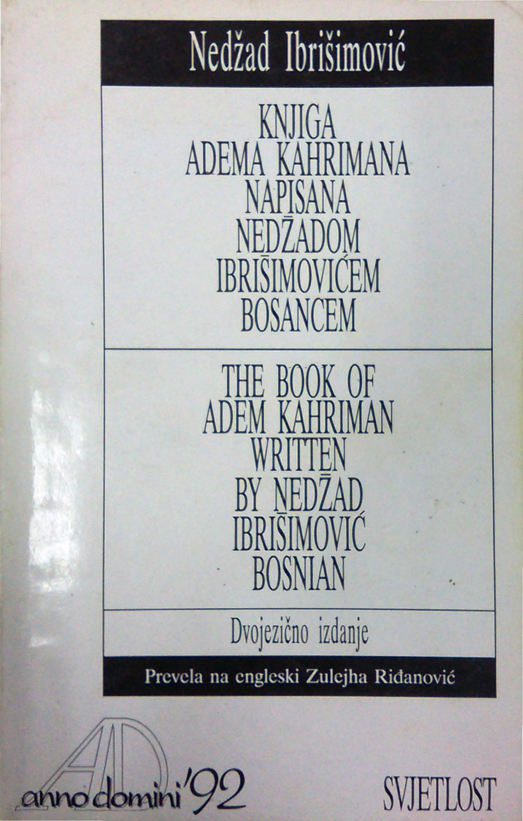 Korica knjige Knjiga Adema Kahrimana napisana Nedžadom Ibrišimovićem Bosancem